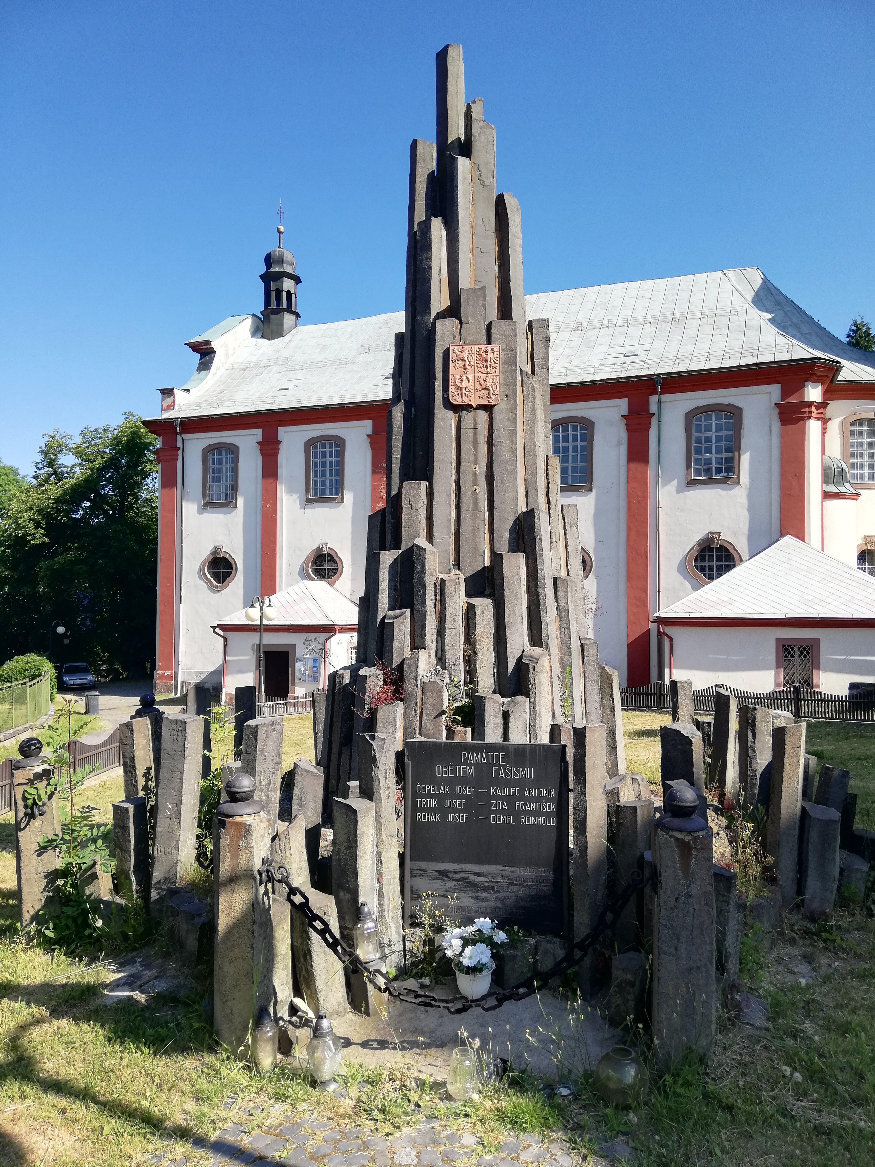 V Kamenickém Šenově stojí u kostela svatého Jana Křtitele asi 8 m vysoký památník ve tvaru pyramidy z čedičových sloupů z Panské skály, slavnostně odhalený k 50. výročí založení místního německého Spolku c. k. válečných veteránů (r. 1912) na počest císaře Františka Josefa I. Přední stranu tehdy zdobil bronzový reliéf s portrétem císaře, deska s věnováním a nejvyšší sloup byl korunován bronzovým dvouhlavým orlem. Po první světové válce umístil spolek německých veteránů kolem pomníku desky se jmény padlých, které byly po druhé světové válce odstraněny i s reliéfem císaře a dvouhlavým orlem. Pomník byl přeměněn na památník obětem fašismu.